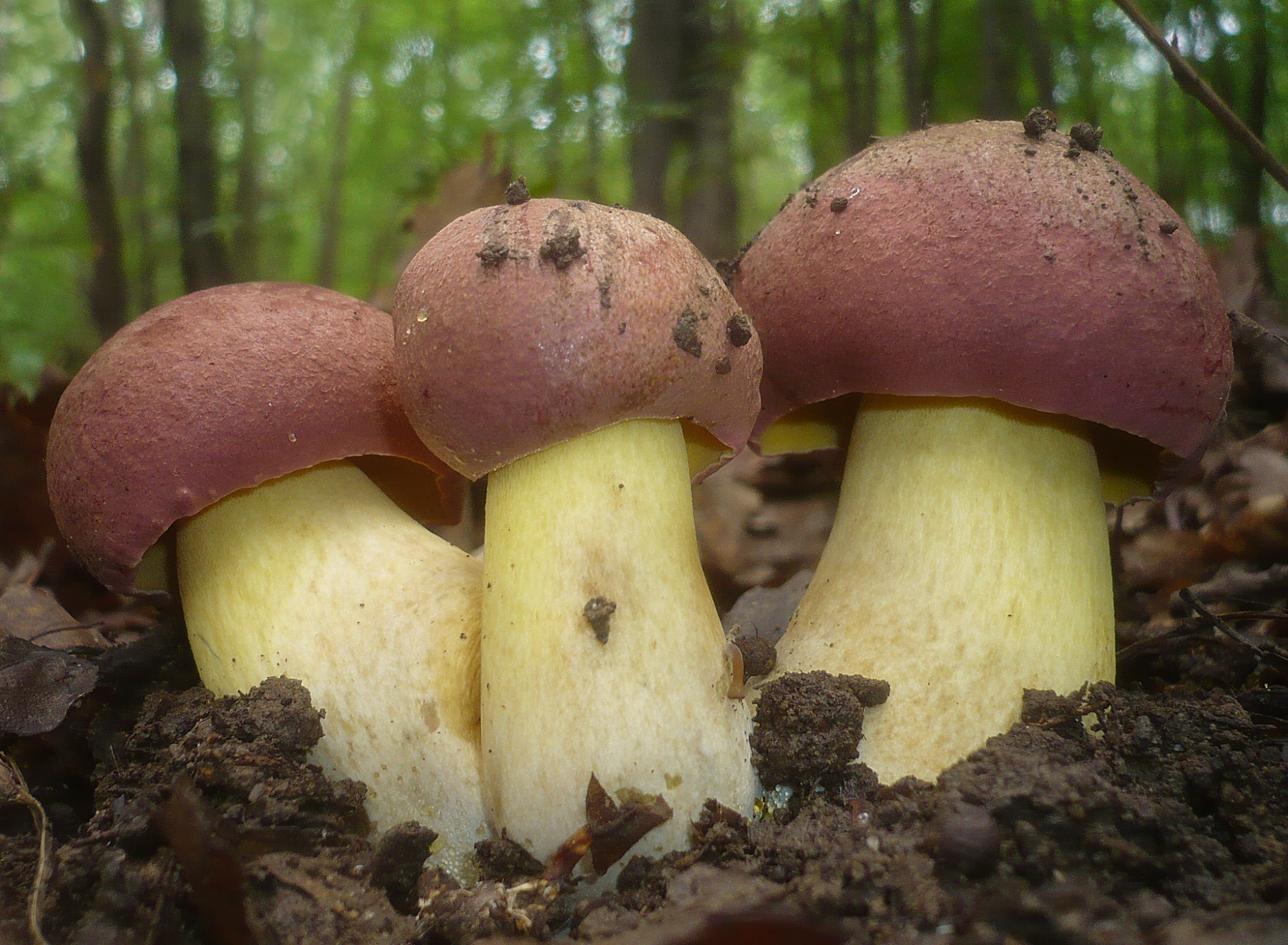 Boletus fuscoroseus Smotlacha